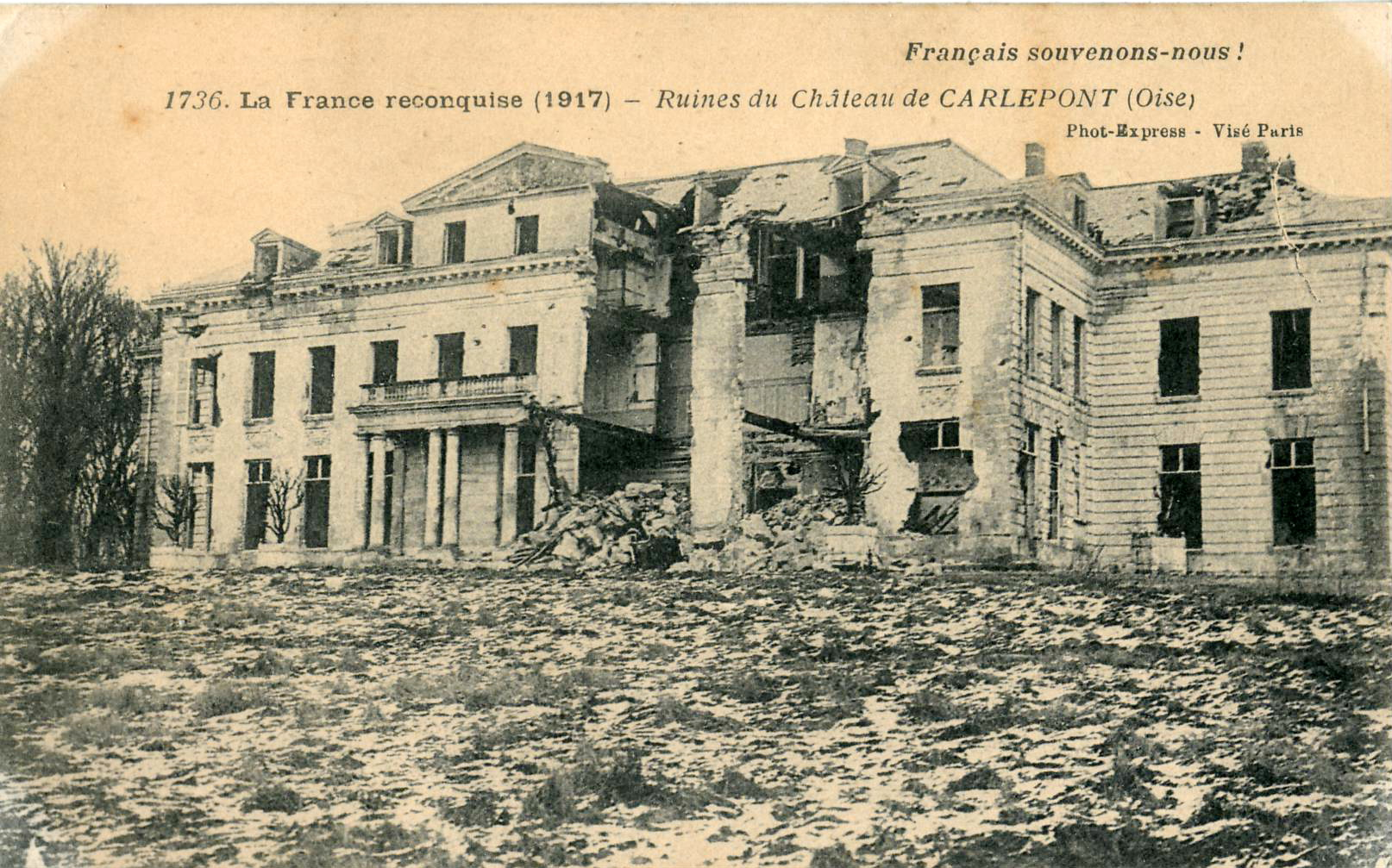 Carte postale ancienne éditée par Phot. Express, mention de censure à Paris, collection La Franec Reconquise (1917) - Ruines du Château de CARLEPONT